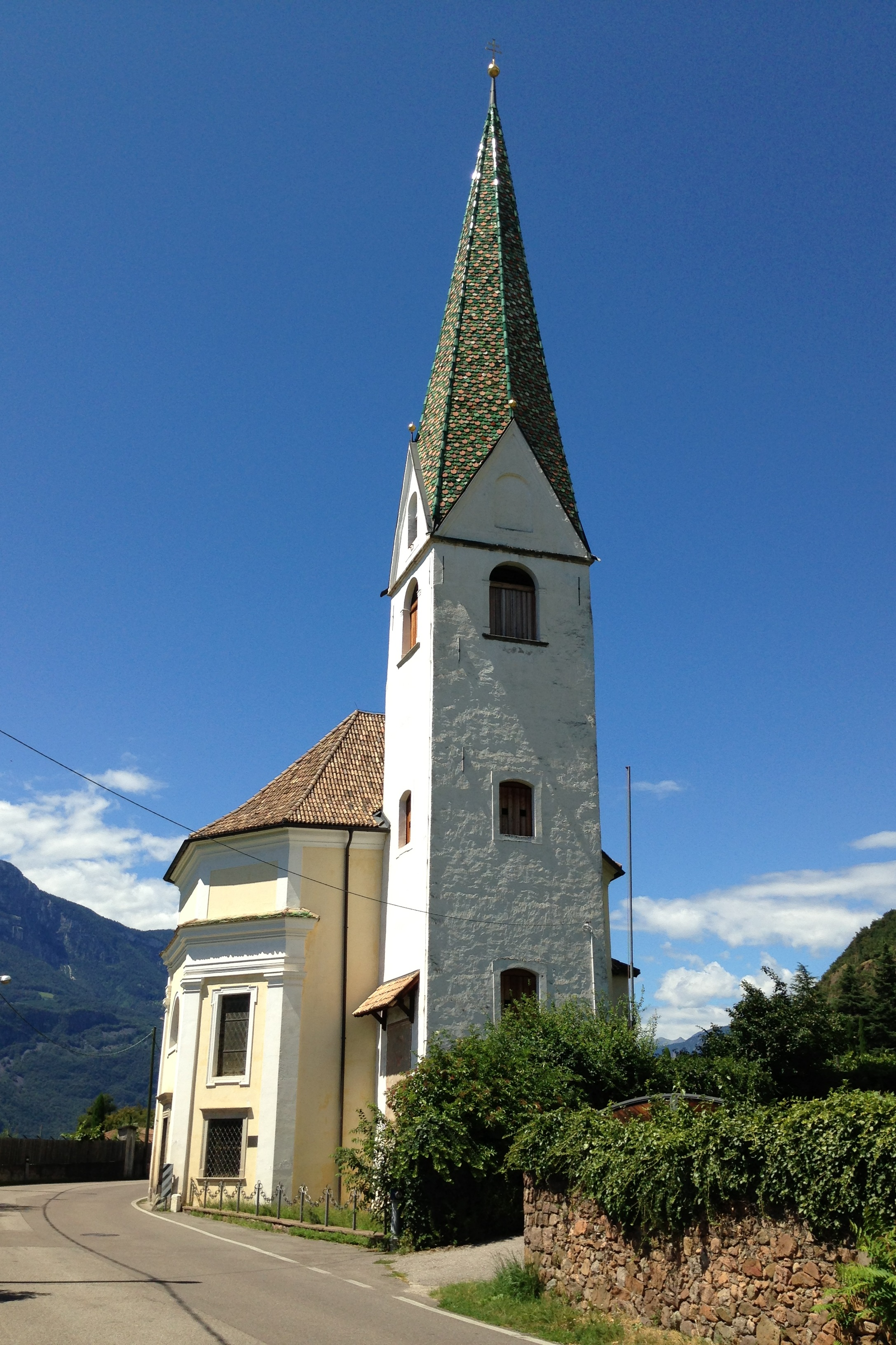 St. Mauritius in Moritzing bei Bozen (Ostansicht)